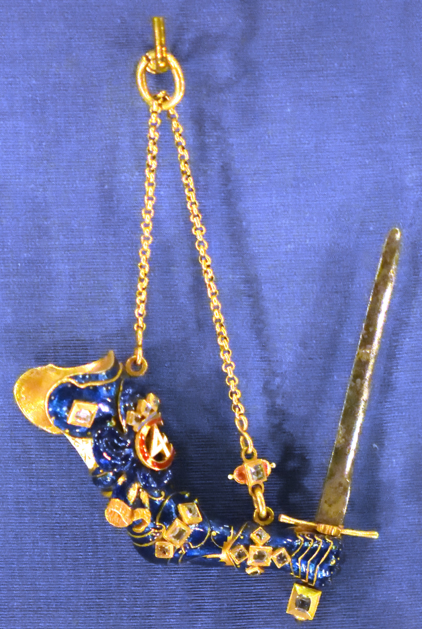 Order Zbrojnego Ramienia, eksponat z Muzeum w Rosenborgu, Kopenhaga